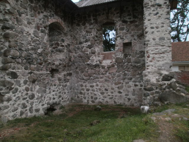 Konvendihoone edelanurk seestpoolt. Enne II Maailmasõda oli hoonetiib veel katustatud ja võlvitud.